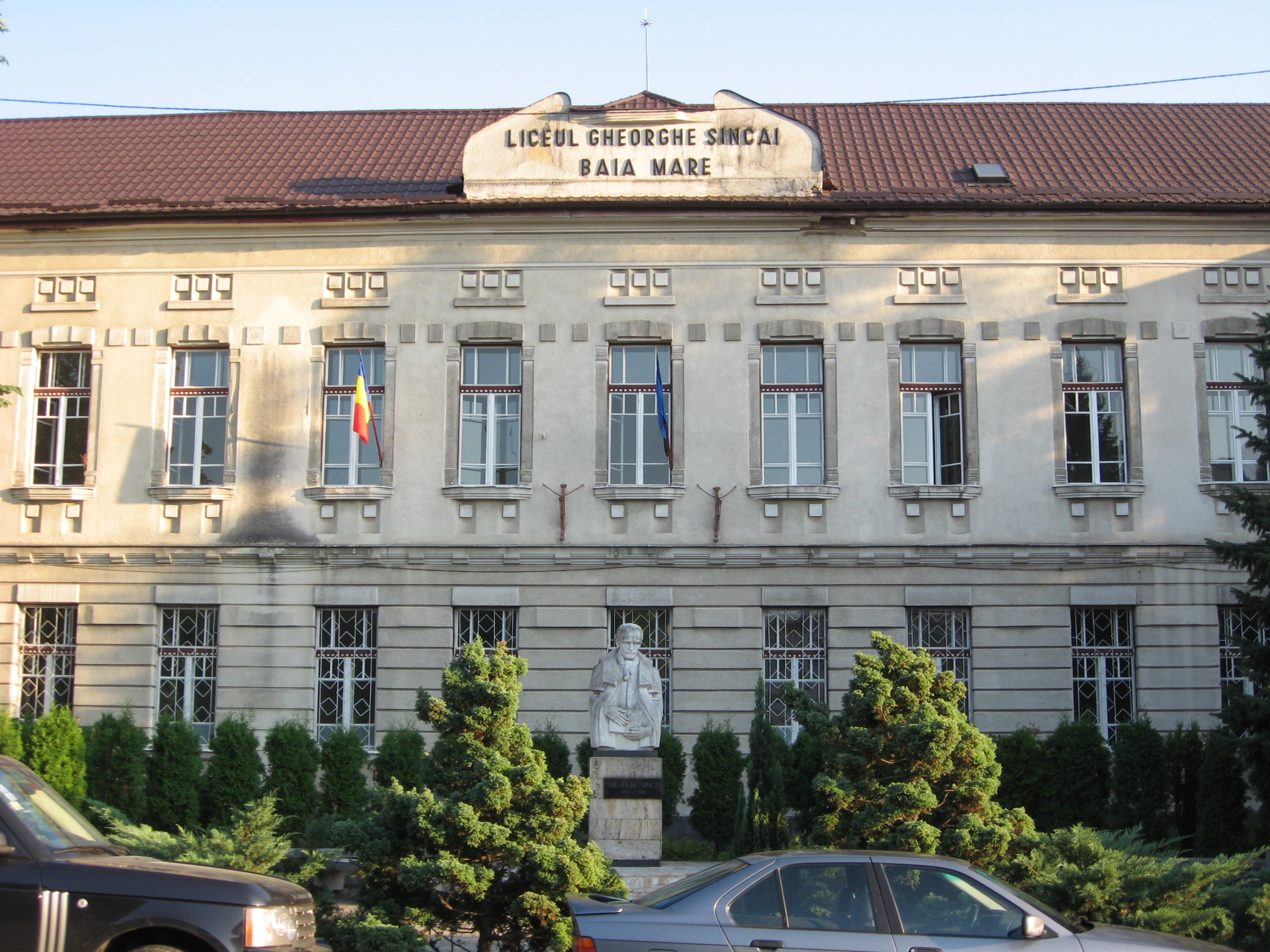 Aceasta este o imagine cu un monument istoric din Romania clasificat cu numarul MM-II-m-B-04488.